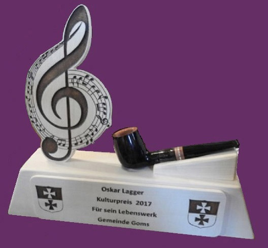 Prix culturel de la commune de Goms (Suisse)